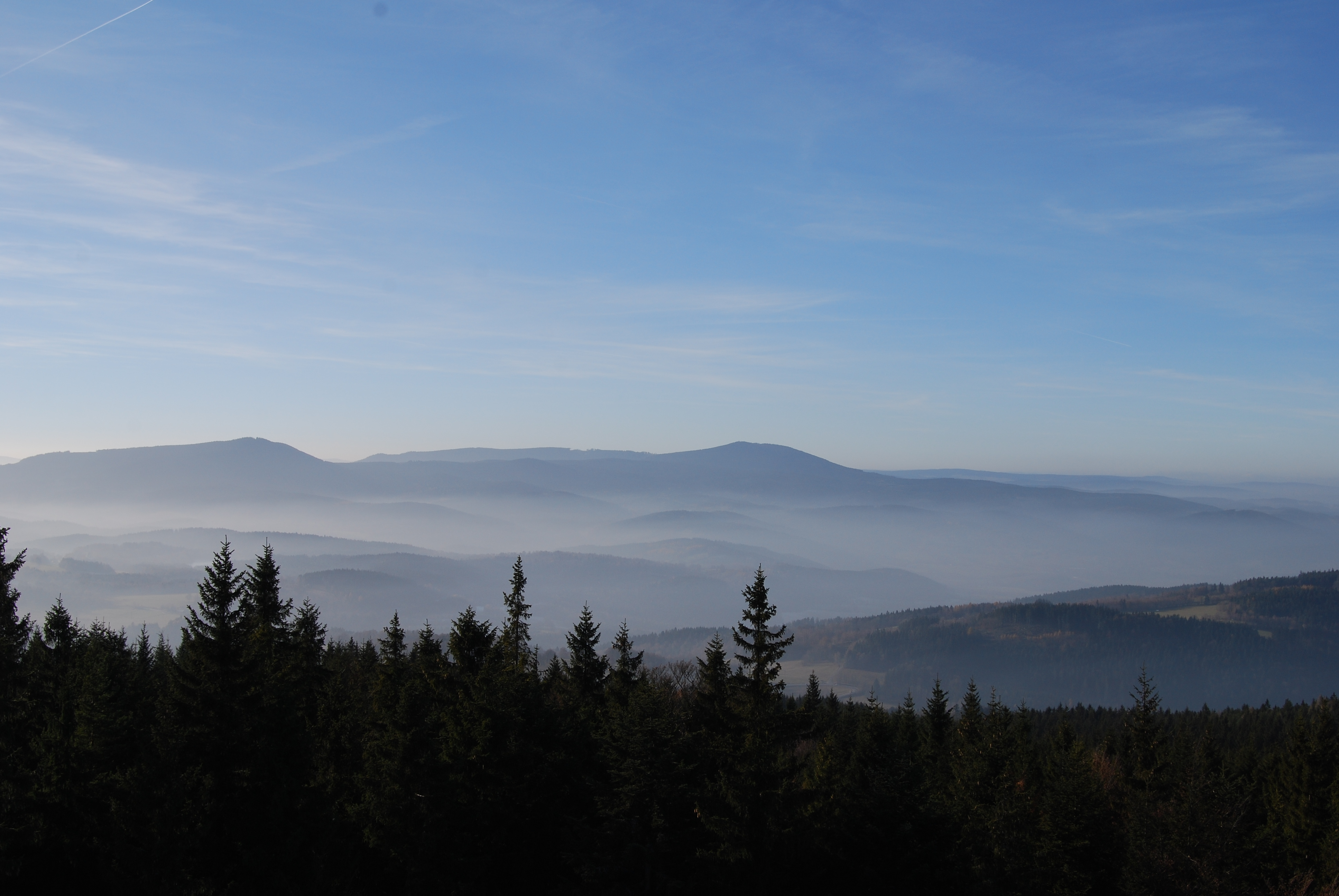 Pohled z rozhledny Libín na Bobík a Boubín přes inverzi. Prachatice. Česko.